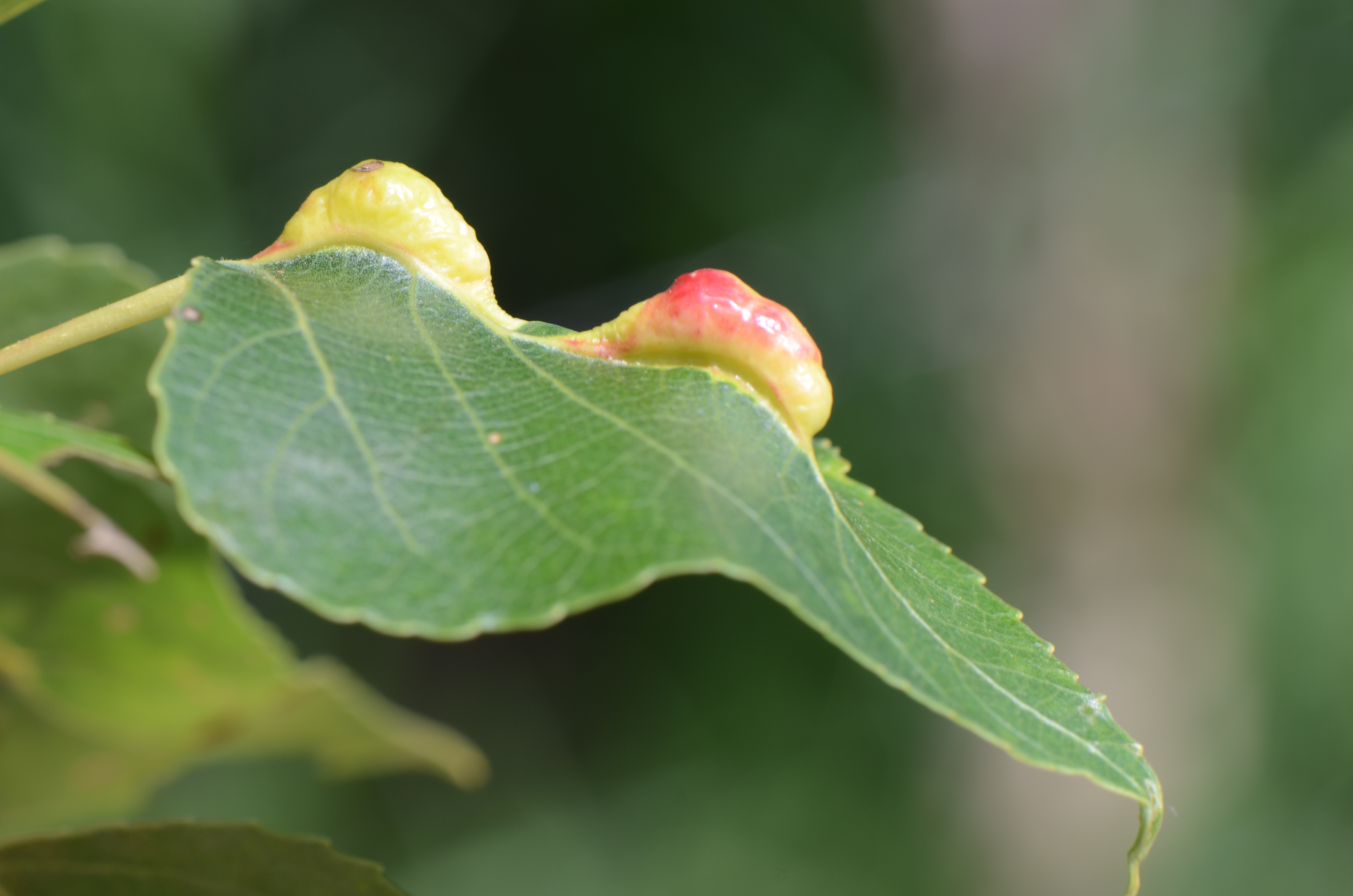 Galle de Pemphigus bursarius sur une feuille de Populus nigra